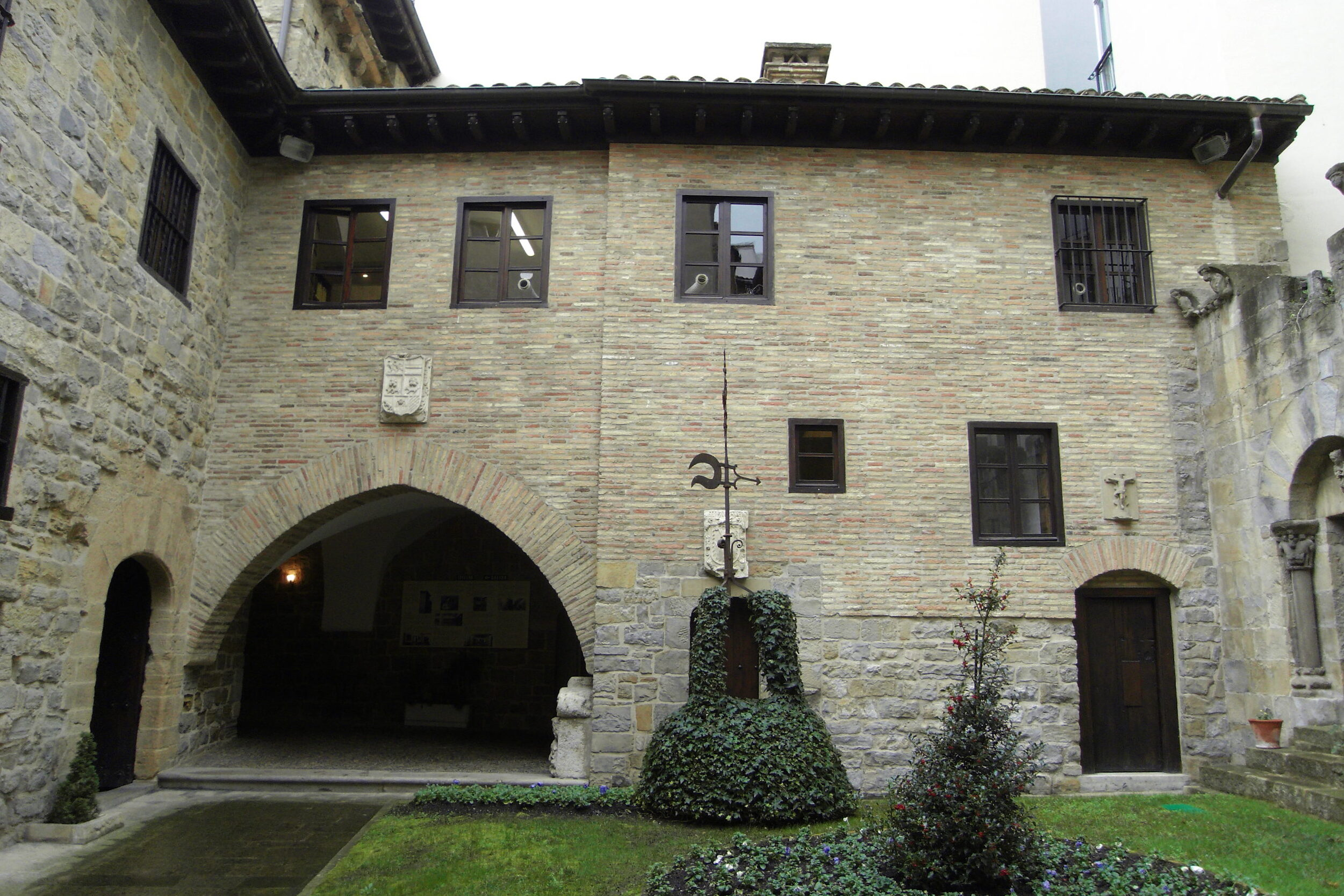 Comptos ganberaren eraikineko patioa eta sarrerako arkua, Iruñean, Nafarroa